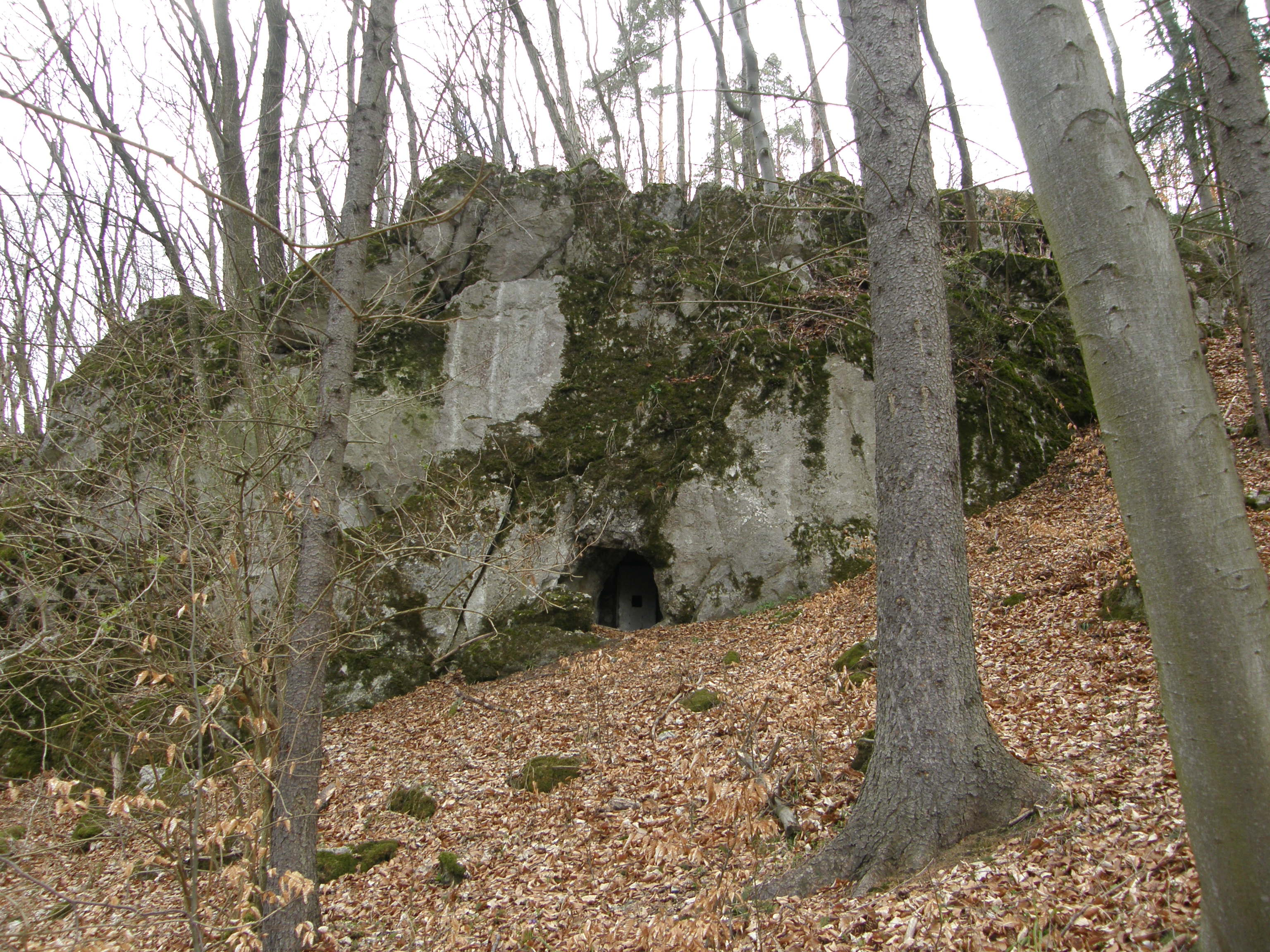 Jeskyne Vokounka